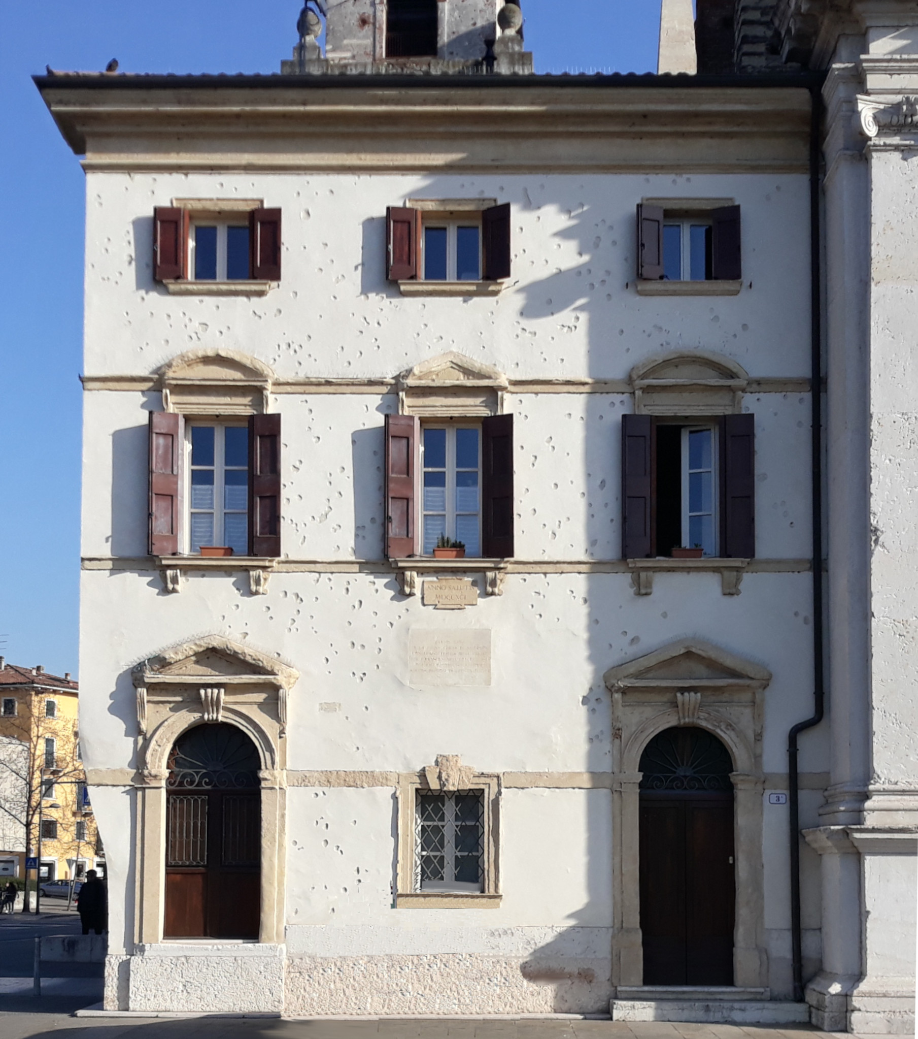 Palazzetto di fianco alla chiesa di San Giorgio in Braida a Verona. Ex canonica